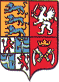 Герб Области прибалтийские